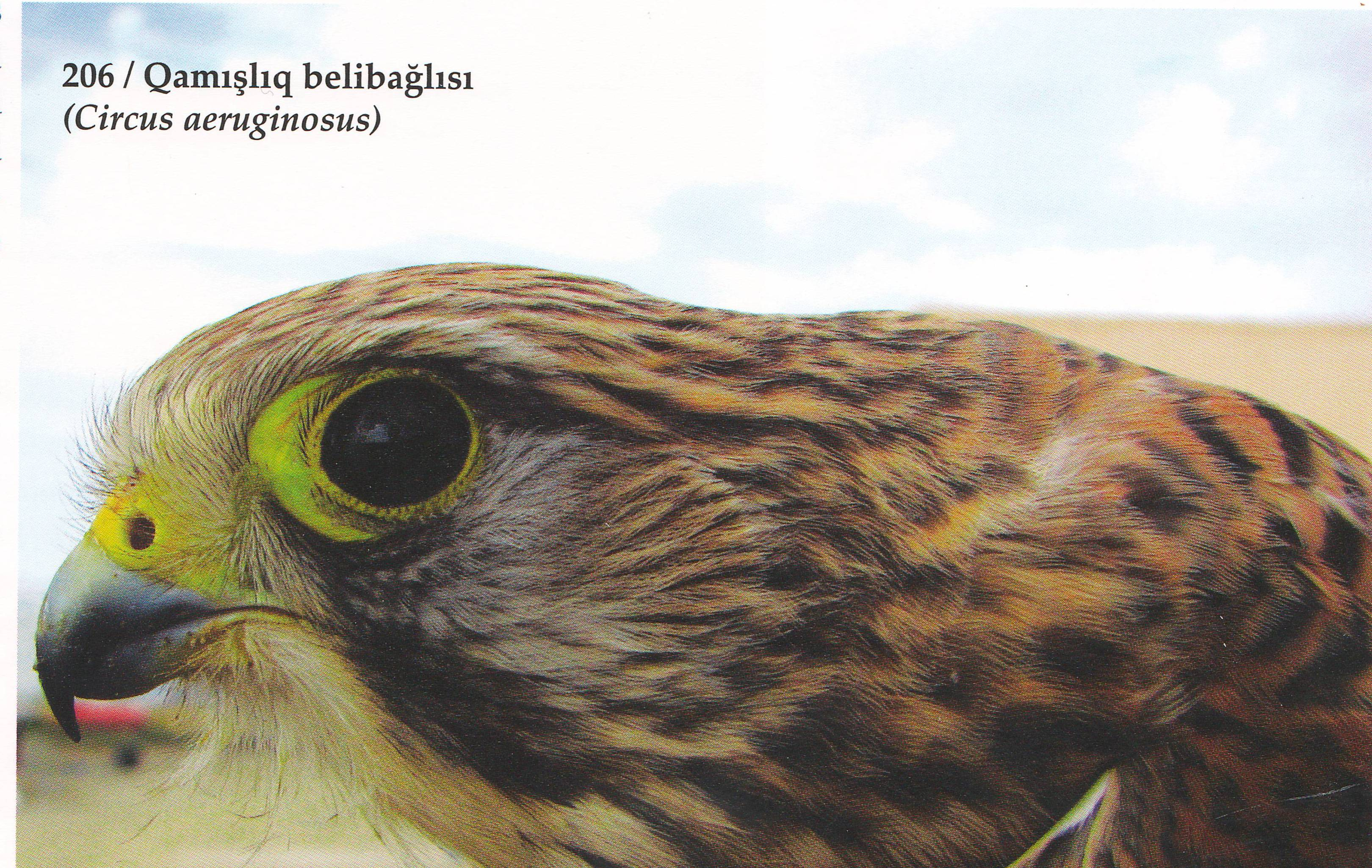 Hacıqabul Qamışlıq belibağlısı